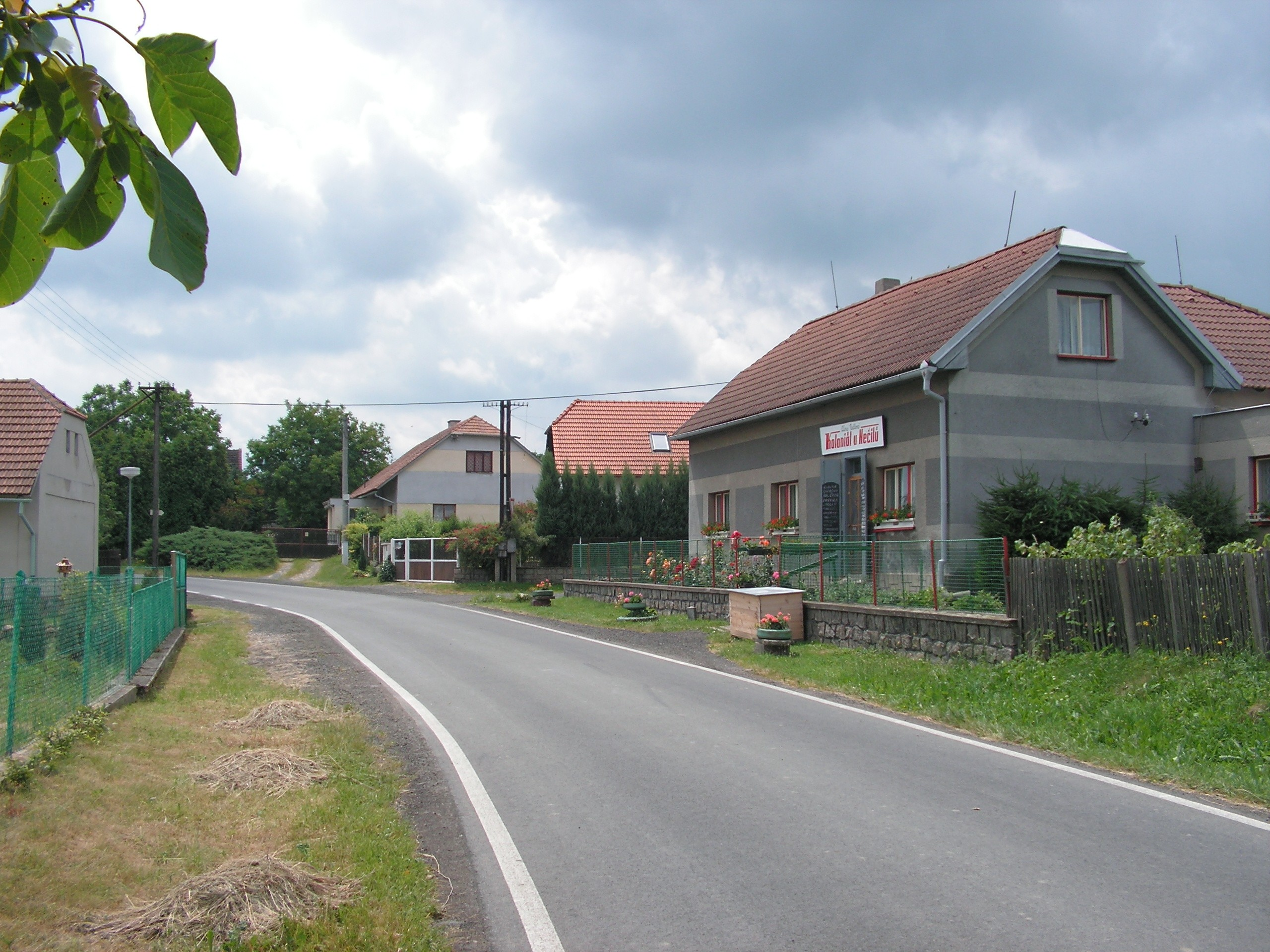 Severní okraj vesničky Chlum, která se nachází jižně od Zbýšova v okrese Kutná Hora.